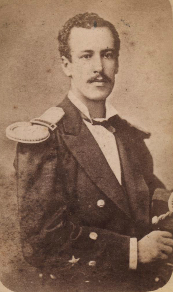 Ernesto Riquelme, retrato de medio cuerpo con uniforme